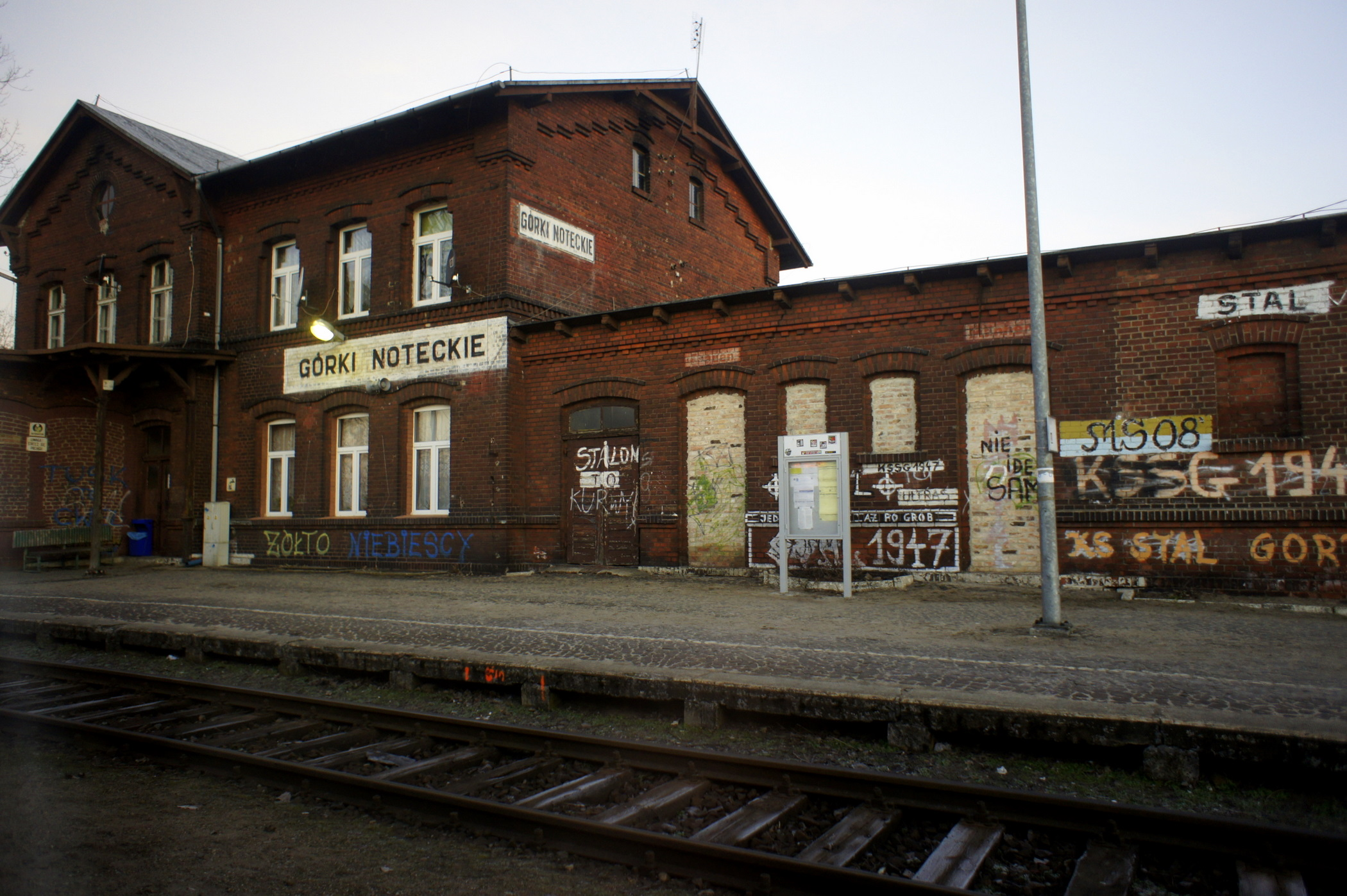 Stacja kolejowa w Górkach Noteckich